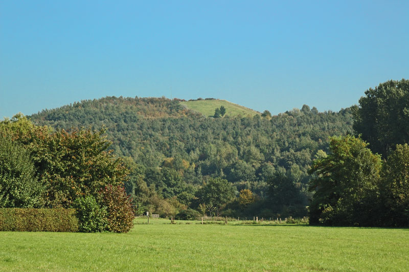 Germany Bergkamen Bergehalde "Grosses Holz". Die Halde ist Bestandteil der Route der Industriekultur